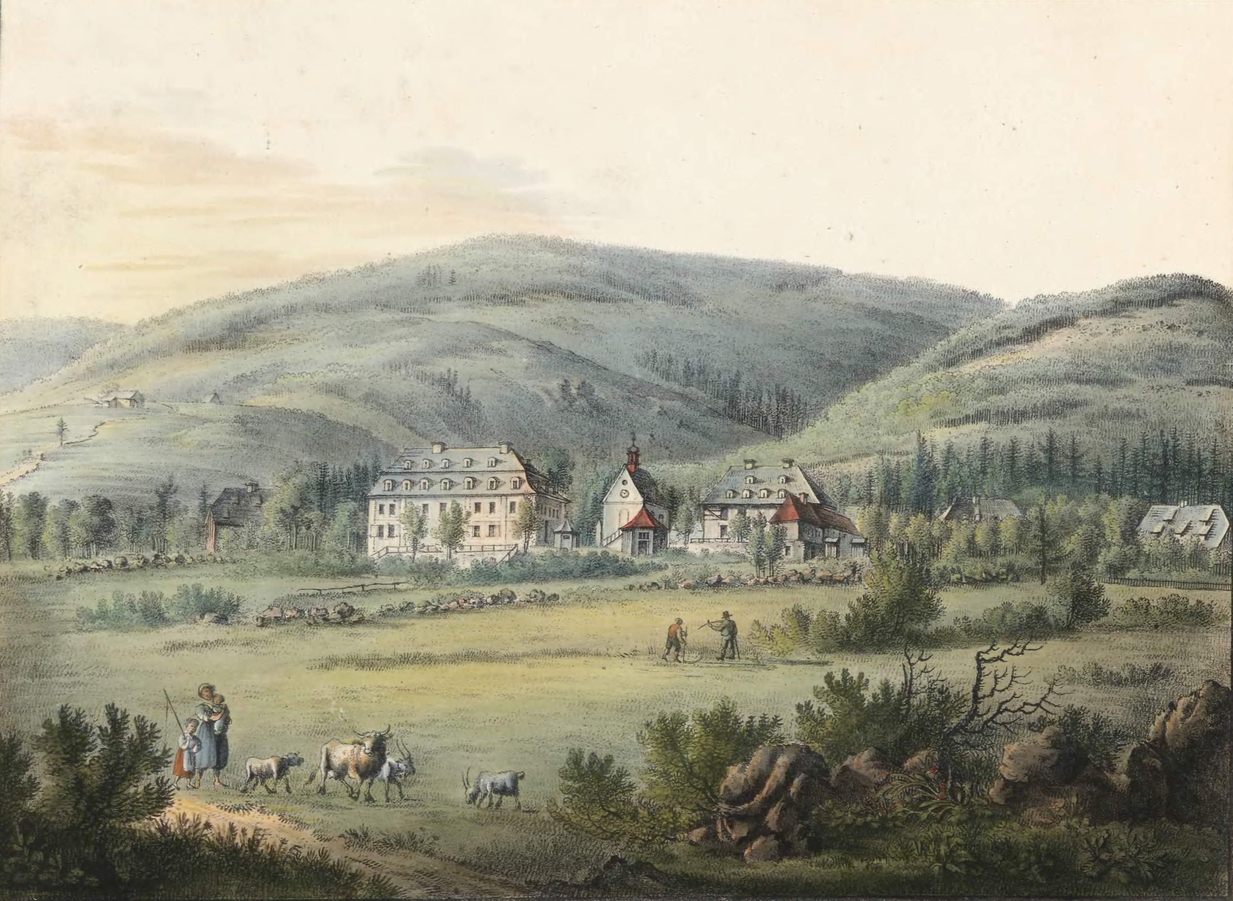 Gesundheitsbrunnen zu Flinsberg, Carl Theodor Mattis